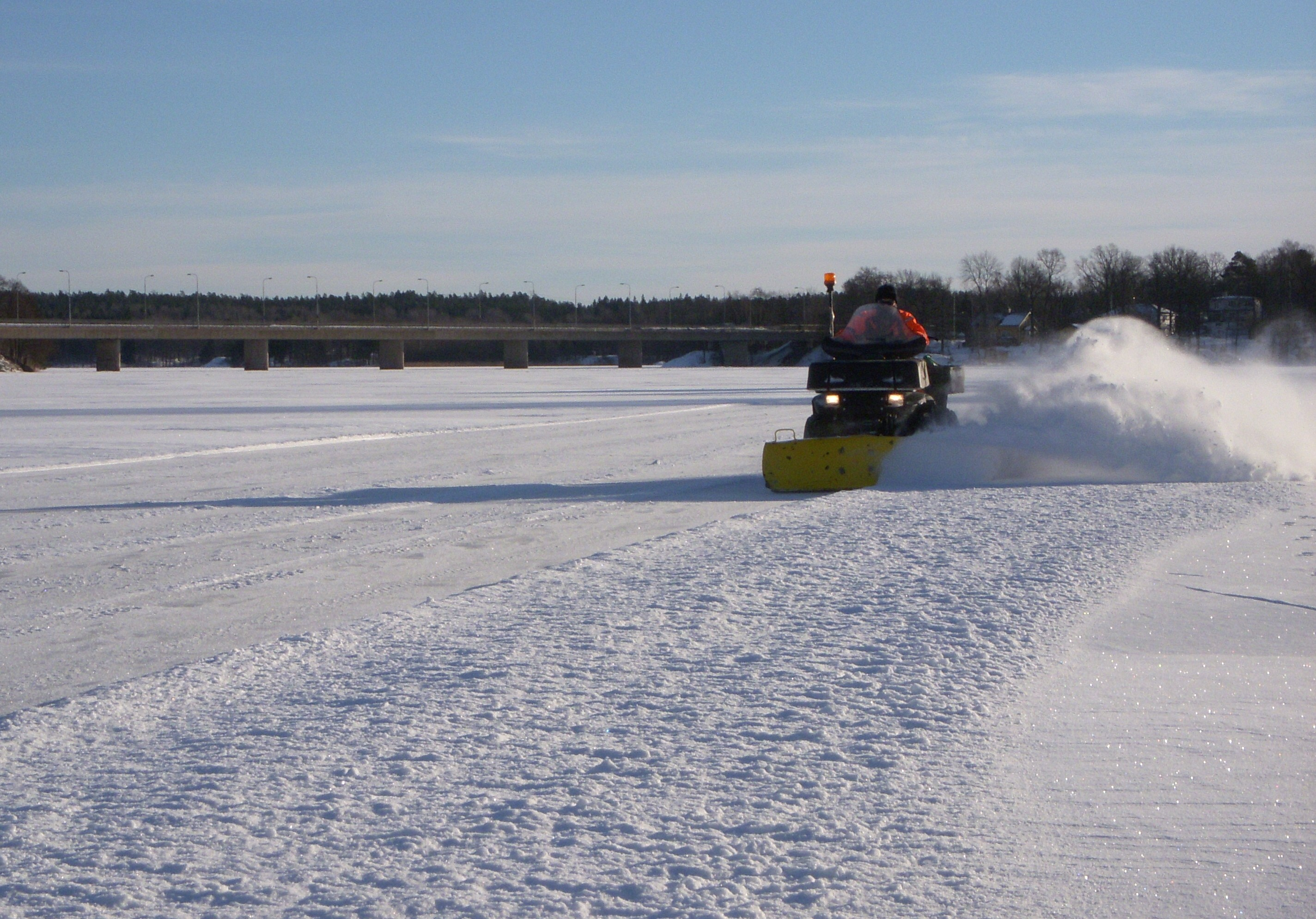 Skridskobana plogas på Magelungen